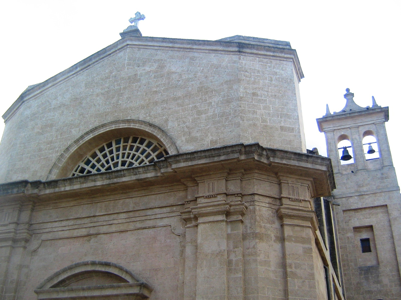 Chiesa Madre e Campanile di Salignano